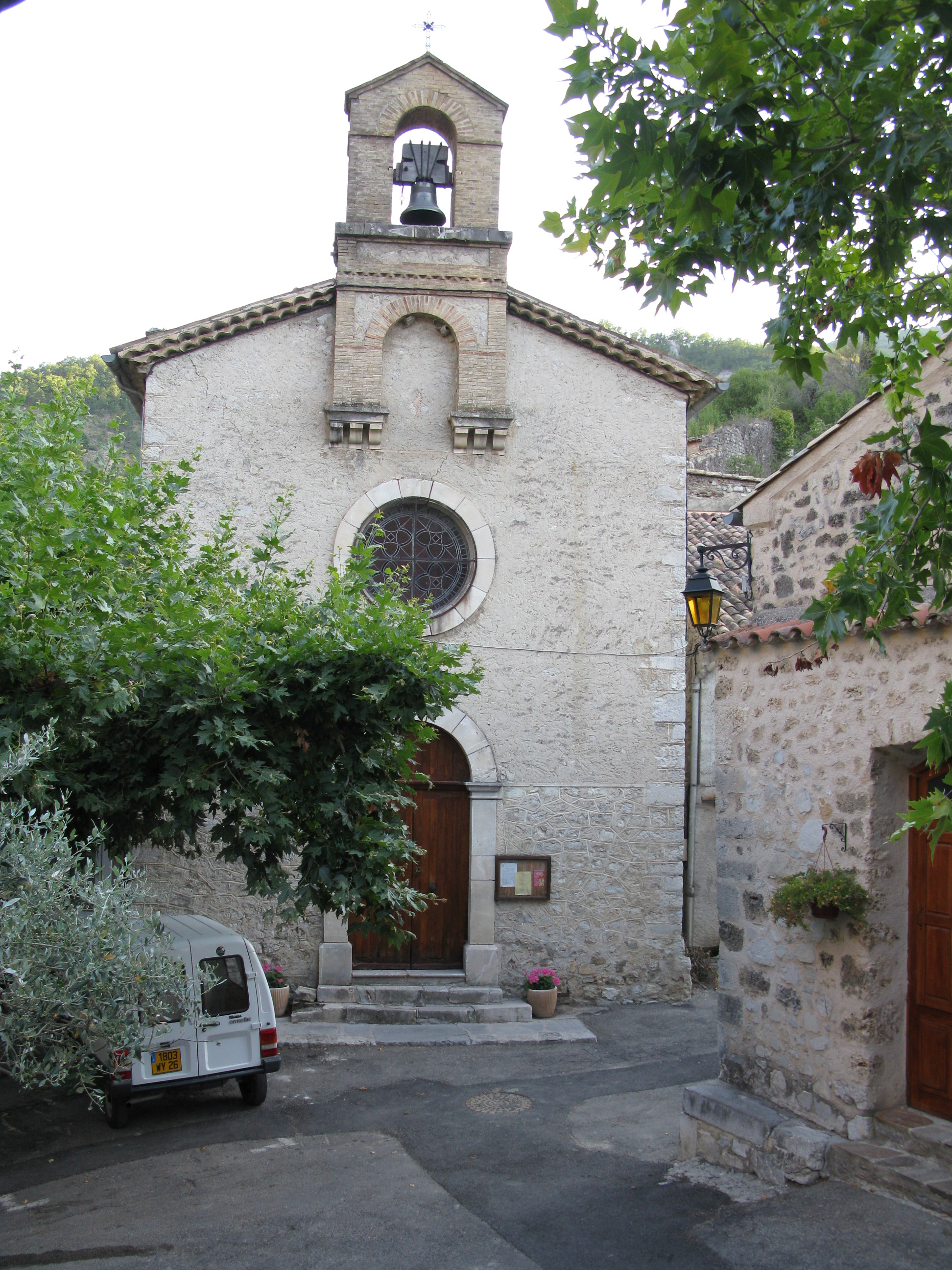 Église de Saint-May (Drôme)